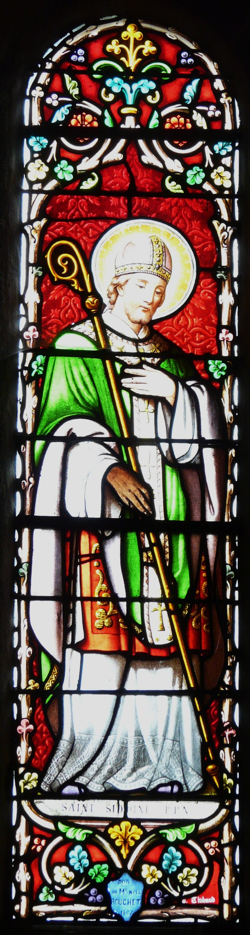 Vitrail d'Émile Thibaud représentant saint Sidoine Apollinaire, église Saint-Sidoine d'Aydat, Puy-de-Dôme, France.